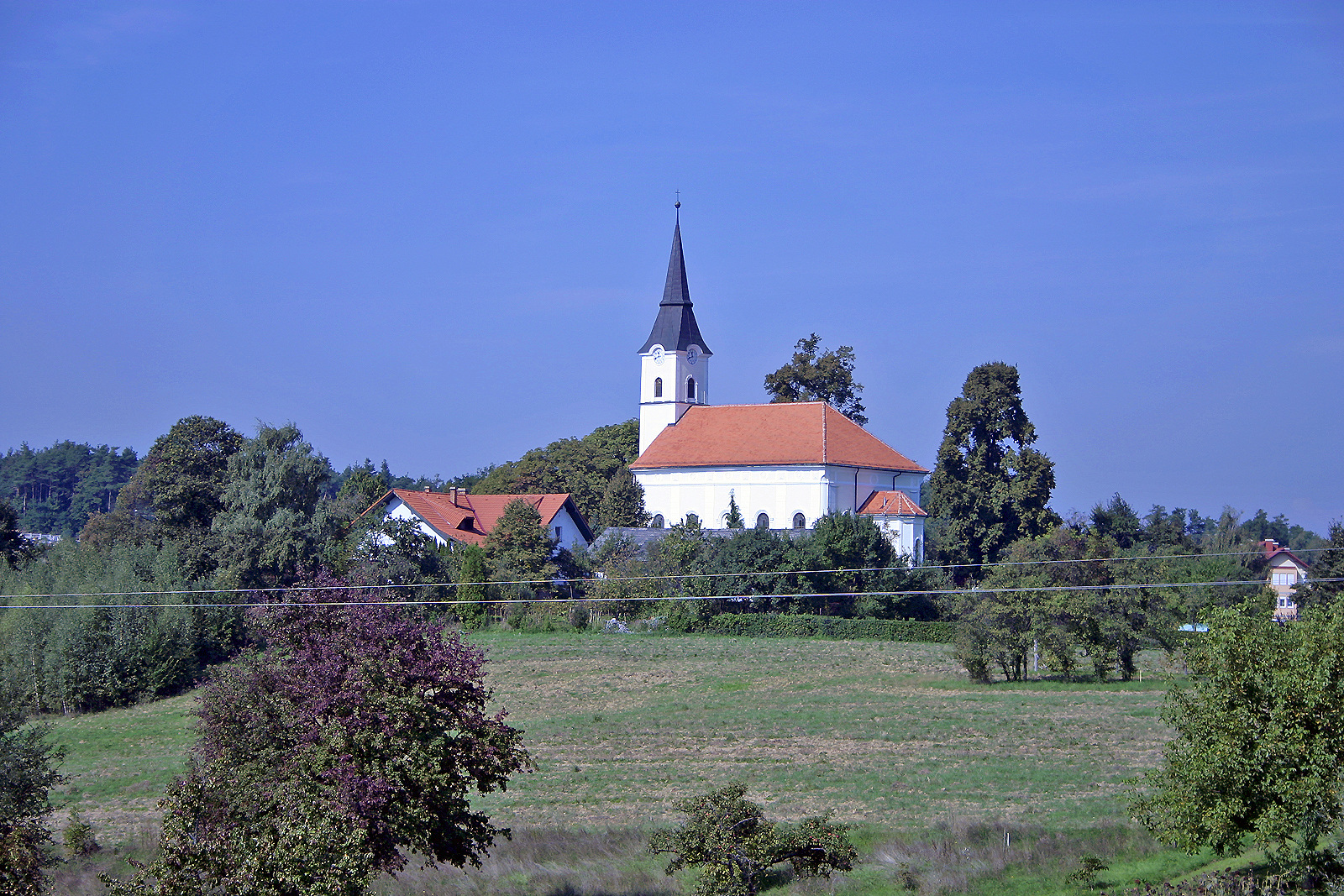 Evangeličanska cerkev, Gornji Petrovci. Evangelical church, Gornji Petrovci. Evangelische Kirche, Gornji Petrovci.